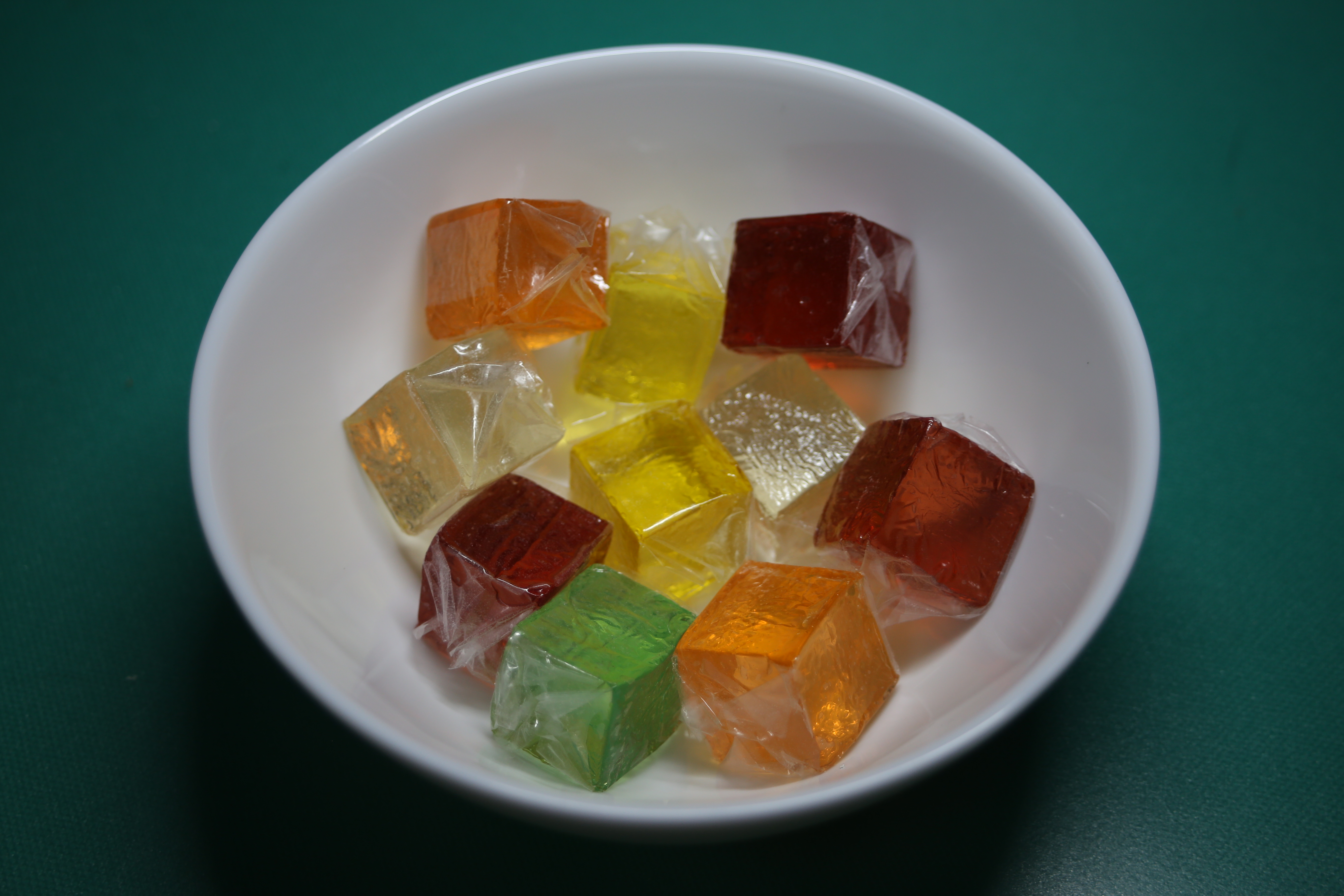 『ミックスゼリー』の商標で販売される愛知県豊橋市に本社を置く金城製菓の寒天ゼリー。水飴・寒天を主な原材料とし、周囲をオブラートによりコーティングしている。